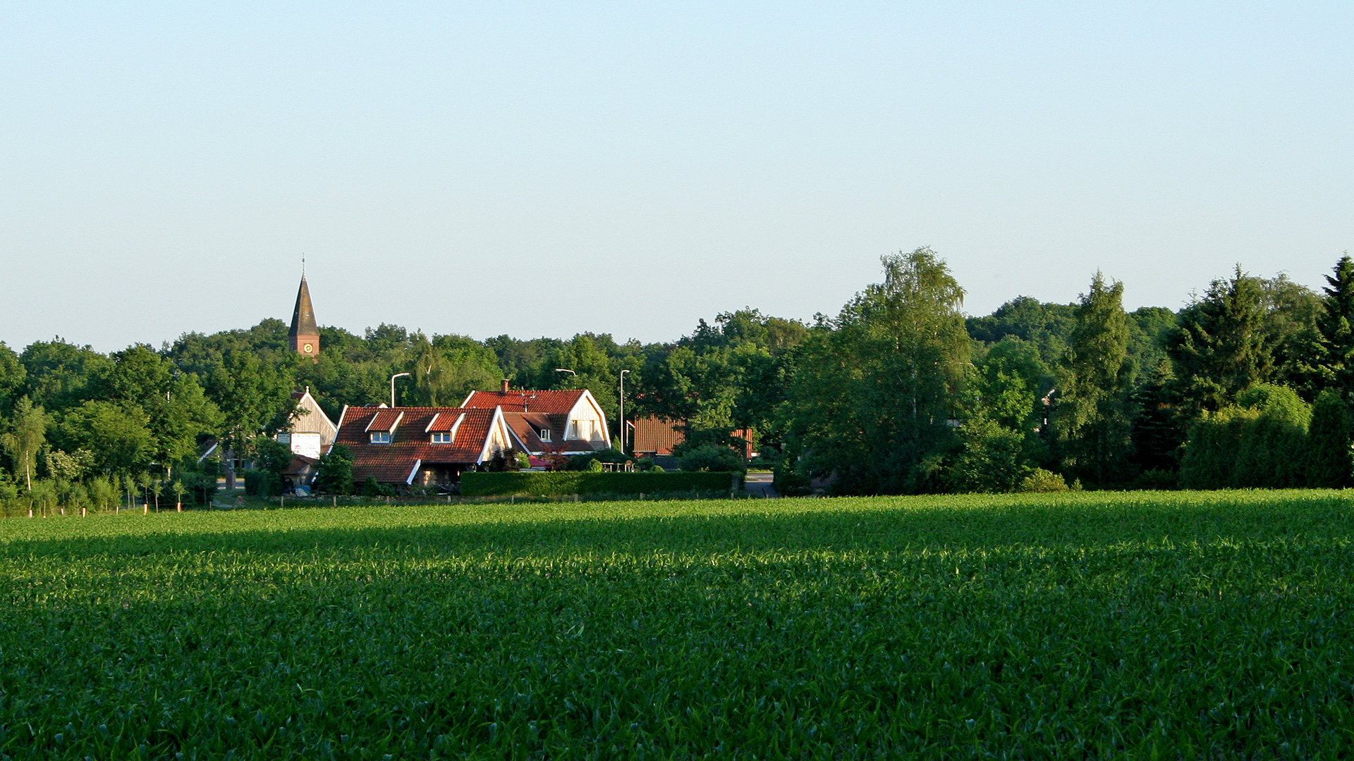 De Lutte